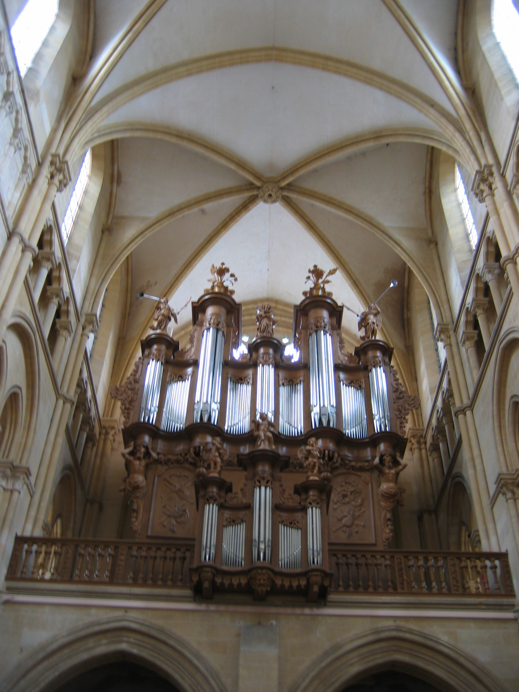 Orgue Abbatiale Mouzon Ardennes France